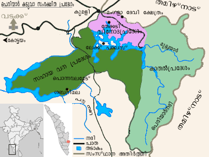 പെരിയാർ കടുവ സംരക്ഷിത പ്രദേശം